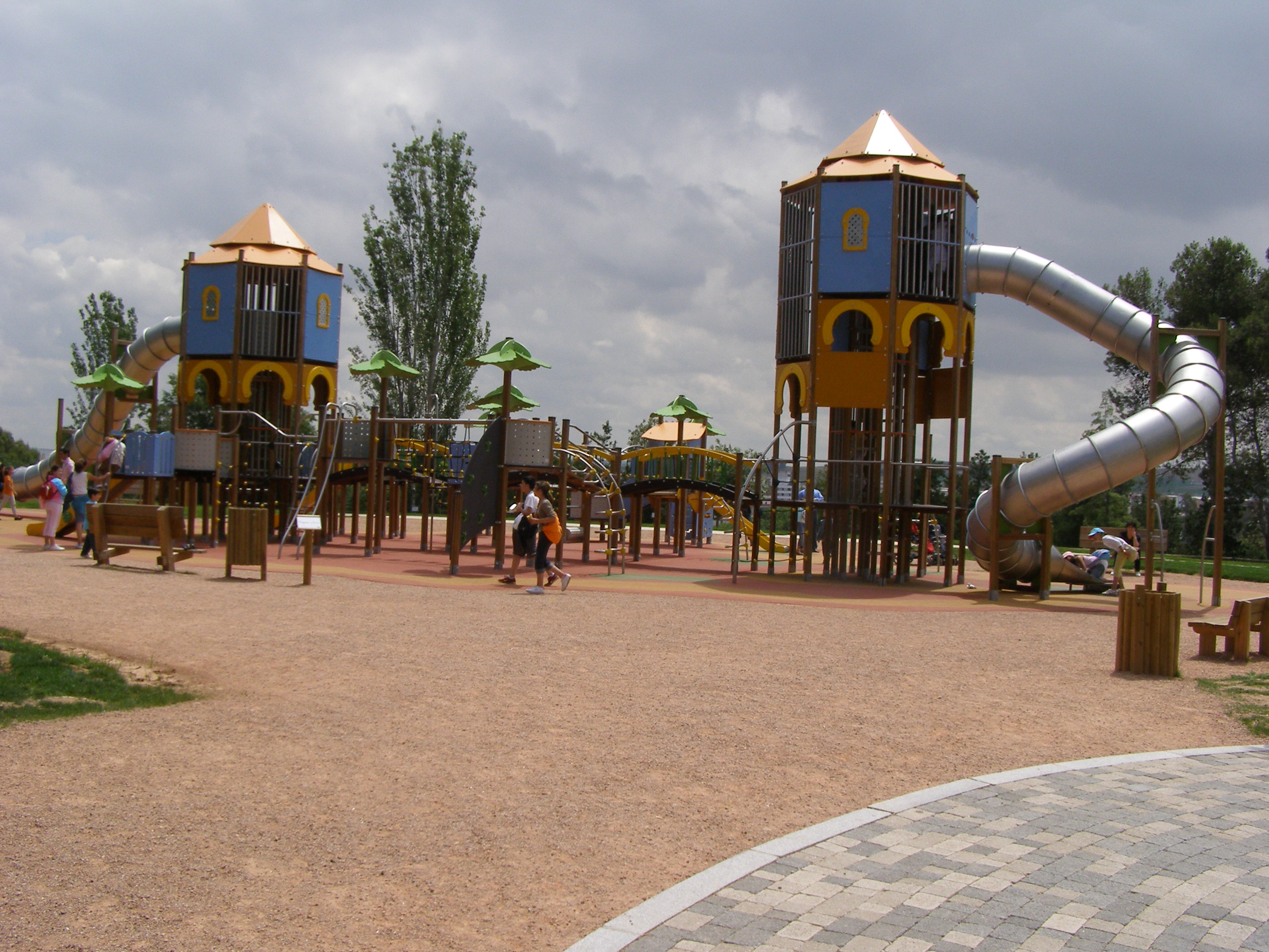 Ciudad de los Niños, Córdoba (España).